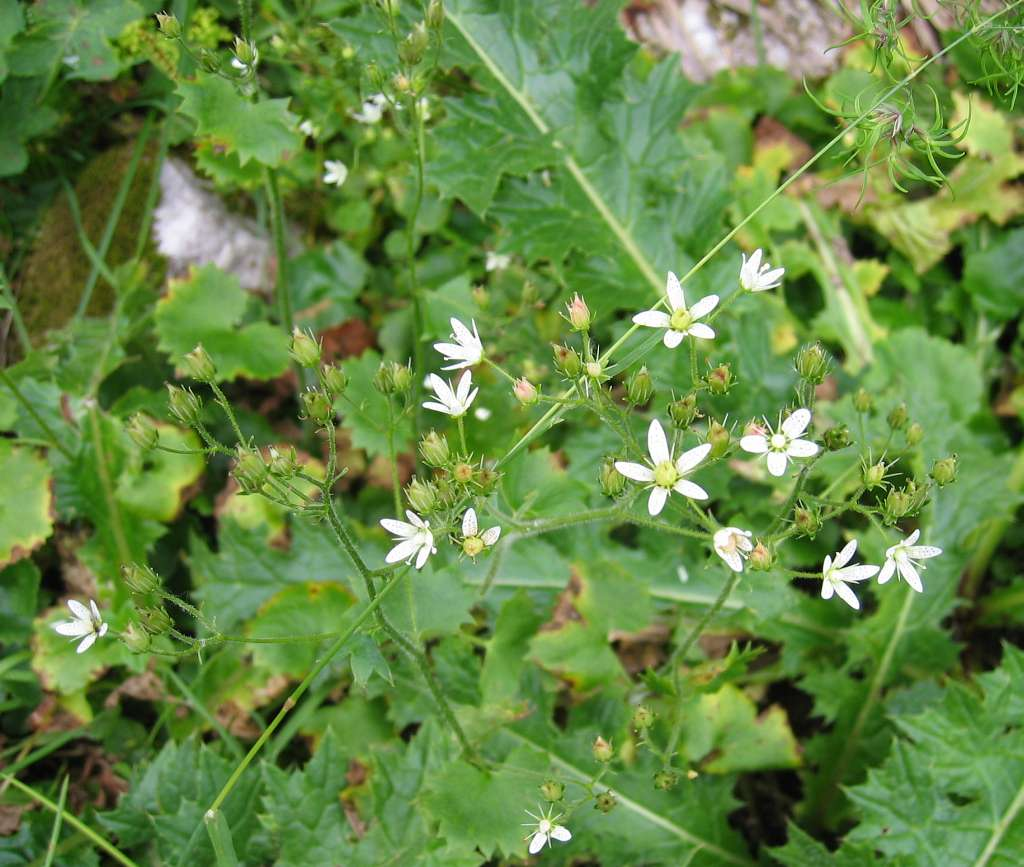 Rundblättriger Steinbrech (Saxifraga rotundifolia) Fundort: Dachsteinplateau, Österreich